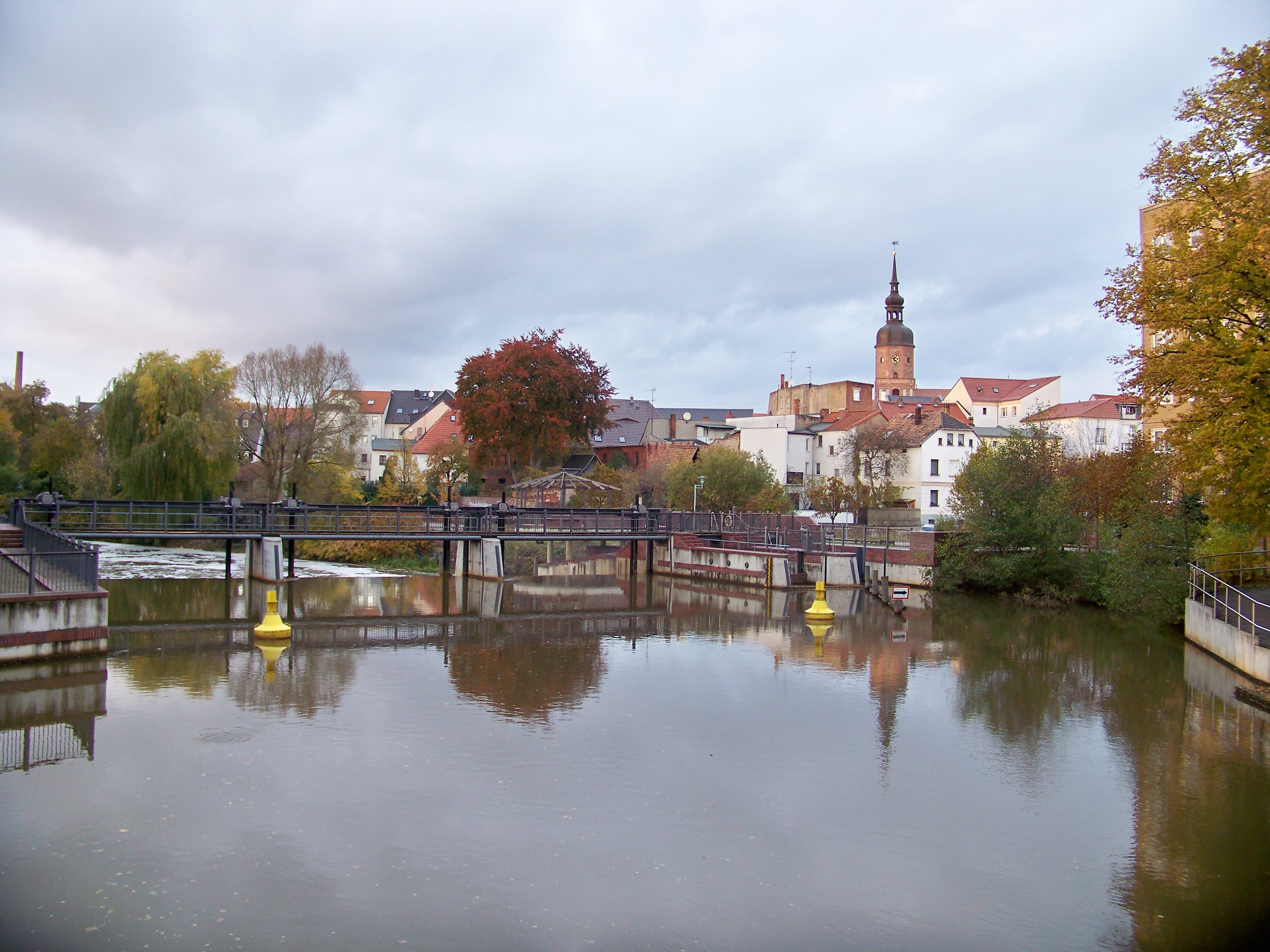 Stadtansicht von Spremberg